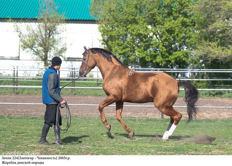 Донской жеребец Зачин